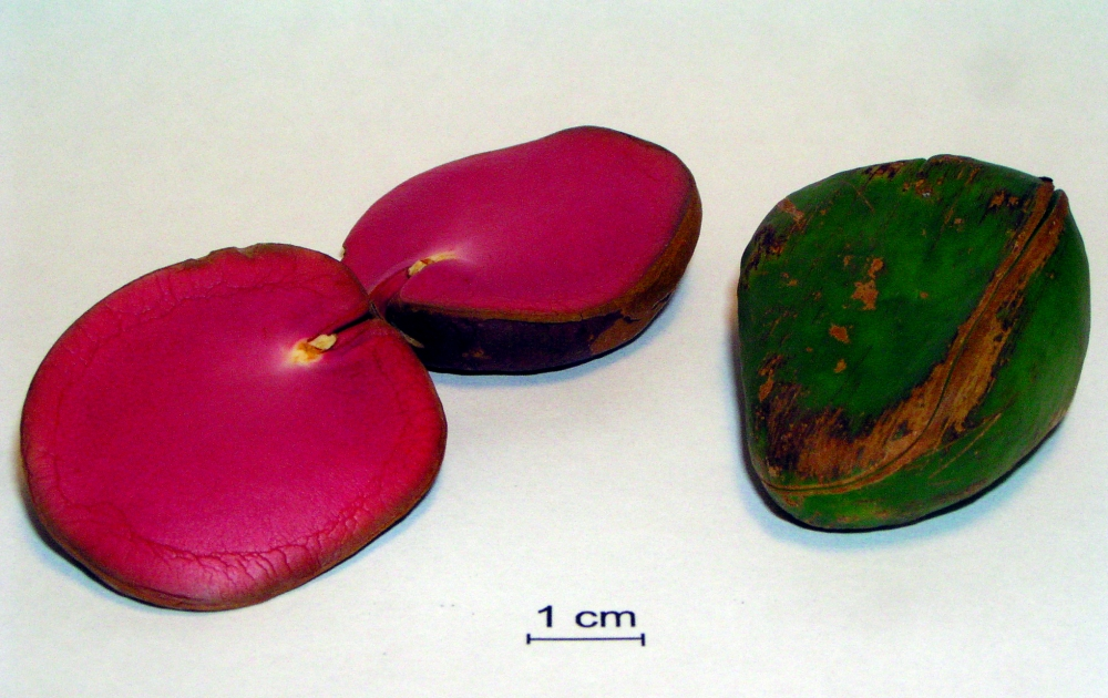 Kolanuß